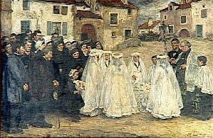 Il s'agit d'une peinture à l'huile représentant un enterrement dans le département des Deux-Sèvres, en France, en 1910.